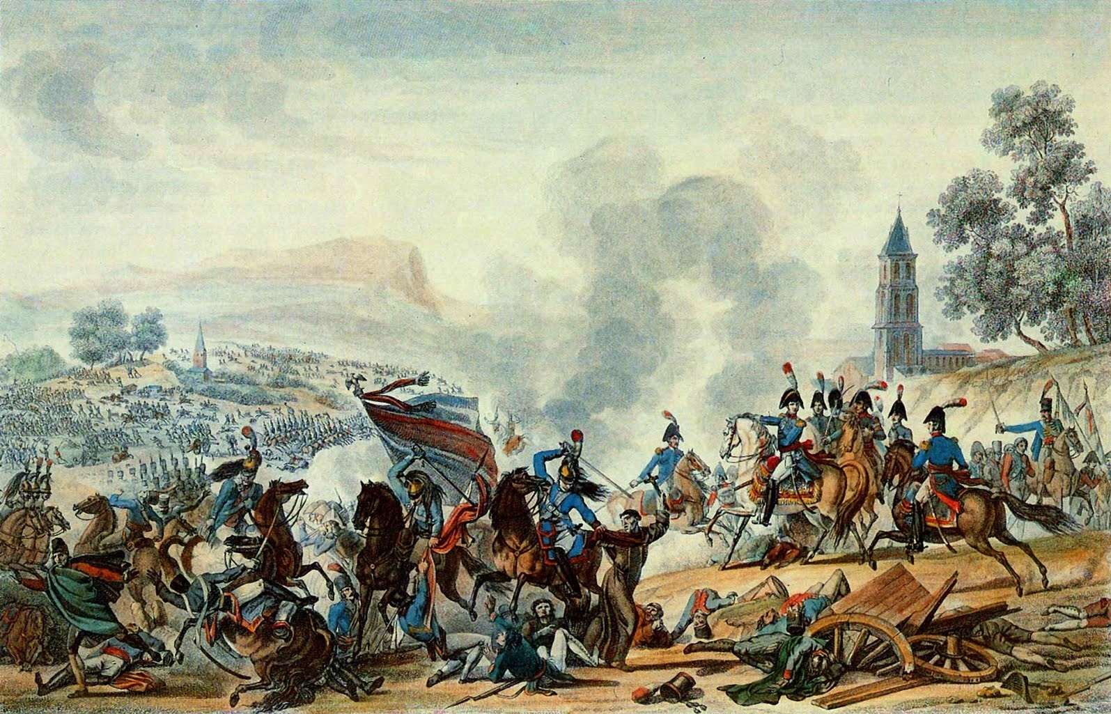 Bataille d'Ocaña, 19 novembre 1809 : les troupes françaises commandées par le roi Joseph Bonaparte et le maréchal Soult écrasent l'armée espagnole du général Areizaga.